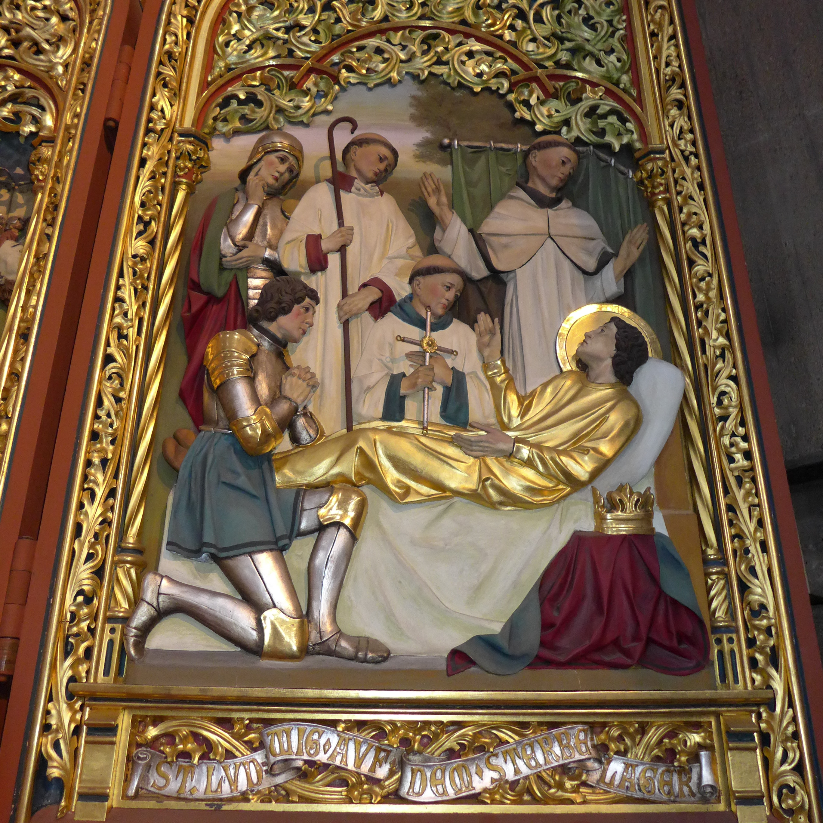 St. Ludwig (Saarlouis), Neogotischer Flügelaltar, Flügelrelief "Tod des hl. Ludwig"